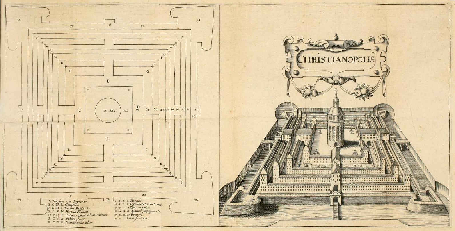 Visualisierung der Idealstadt Christianopolis aus Johann Valentin Andreaes Reipublicae Christianopolitanae descriptio. Argentorati 1619